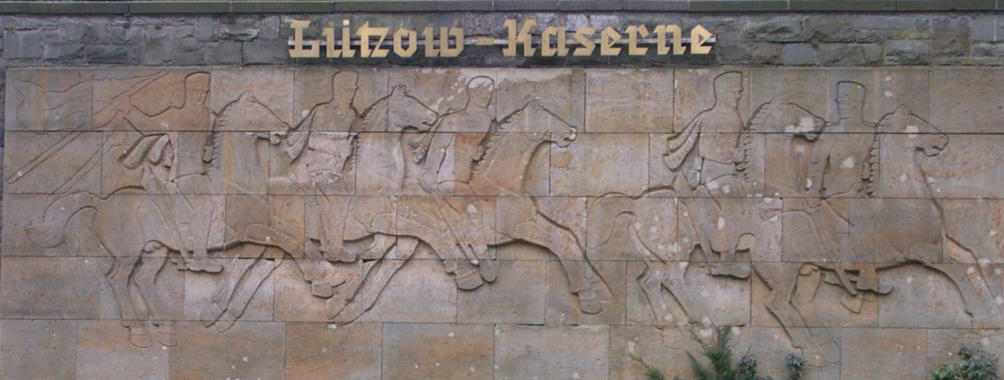 Relief Fünf reitende Lützower Jäger von Carl Moritz Schreiner an der Lützow-Kaserne in Aachen